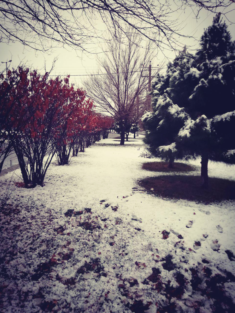 میدان چمران دلیجان در یک روز برفی